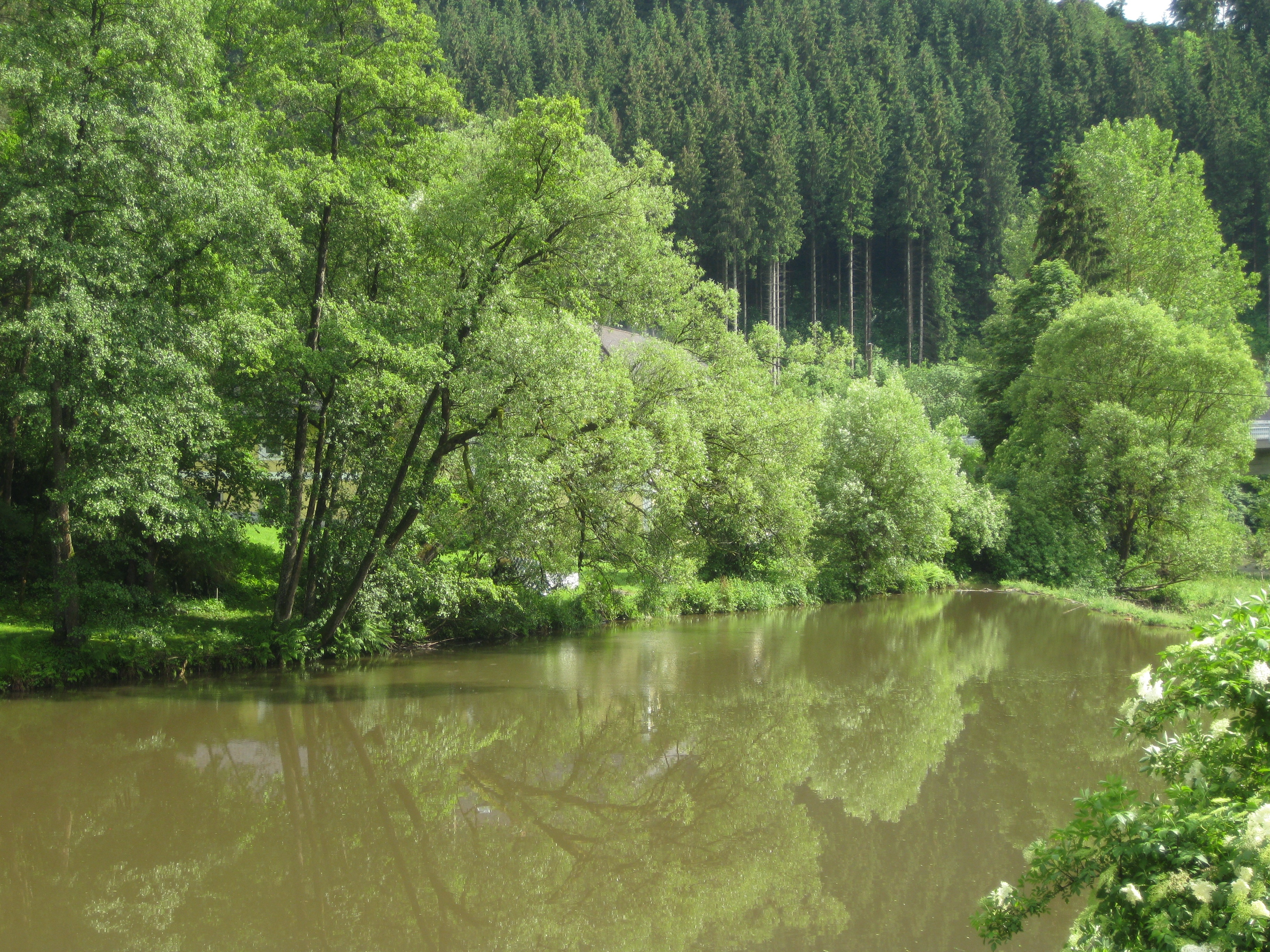 in der Großen Mühl bei der Bruckmühle